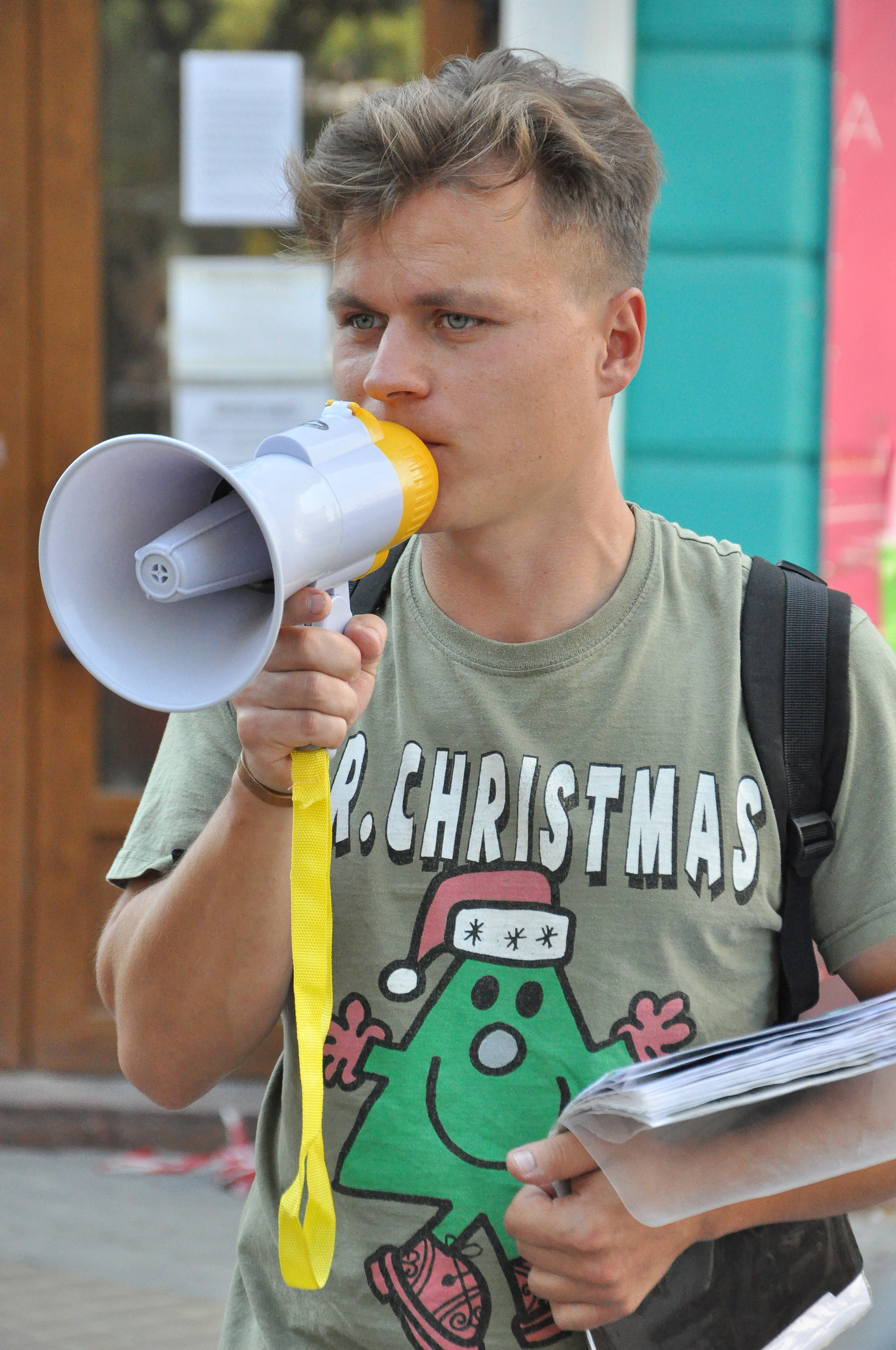 Український краєзнавець, екскурсовод, музикант Тарас Циклиняк.